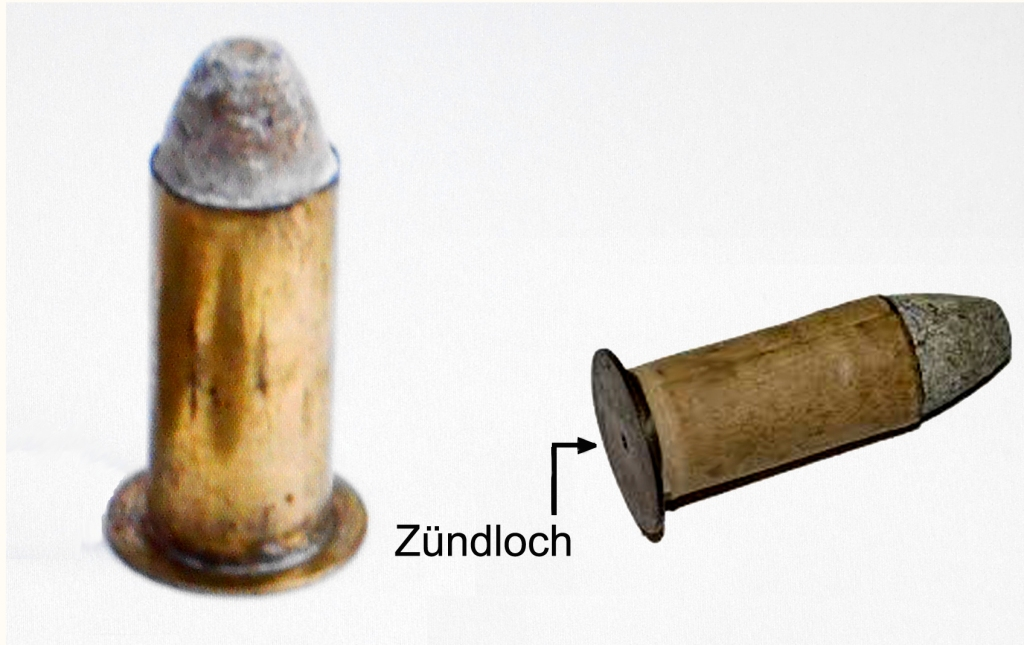 Maynard Patrone